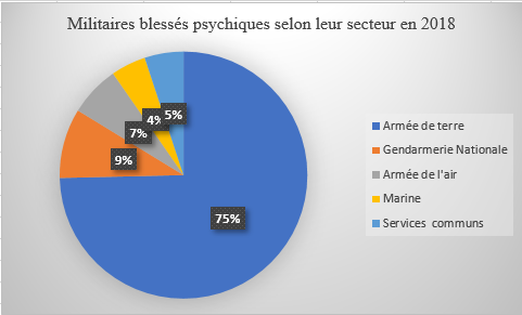 Graphique en pourcentage